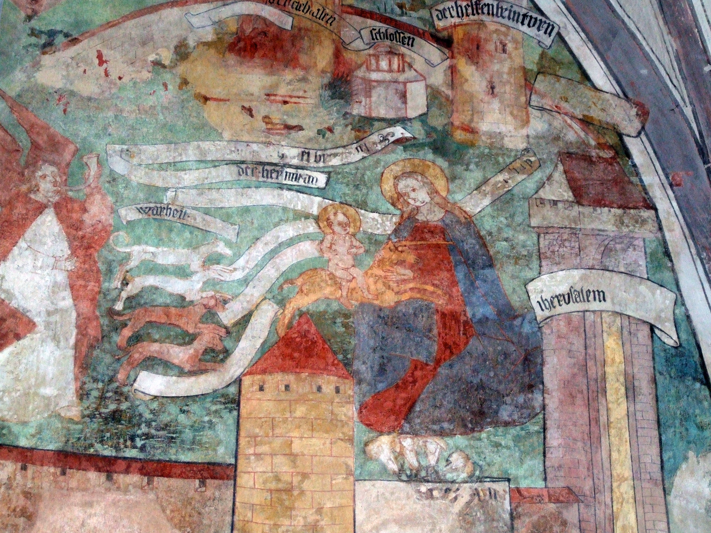 Unser Frauen in Memmingen, Marienzyklus, Das Jesuskind wird auf einem Einhorn in den Schoß Mariens mit Hunden getrieben